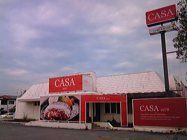 CASA山鹿店（熊本県山鹿市/旧：グルッペ）